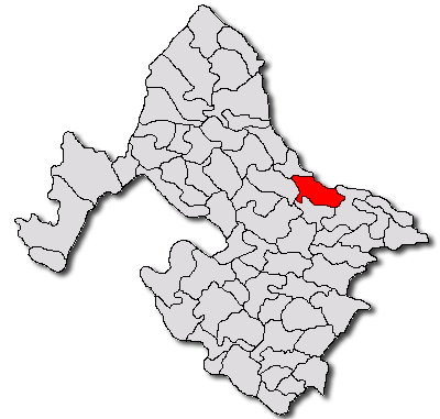 Categorie:Hărţi ale judeţului Mehedinţi